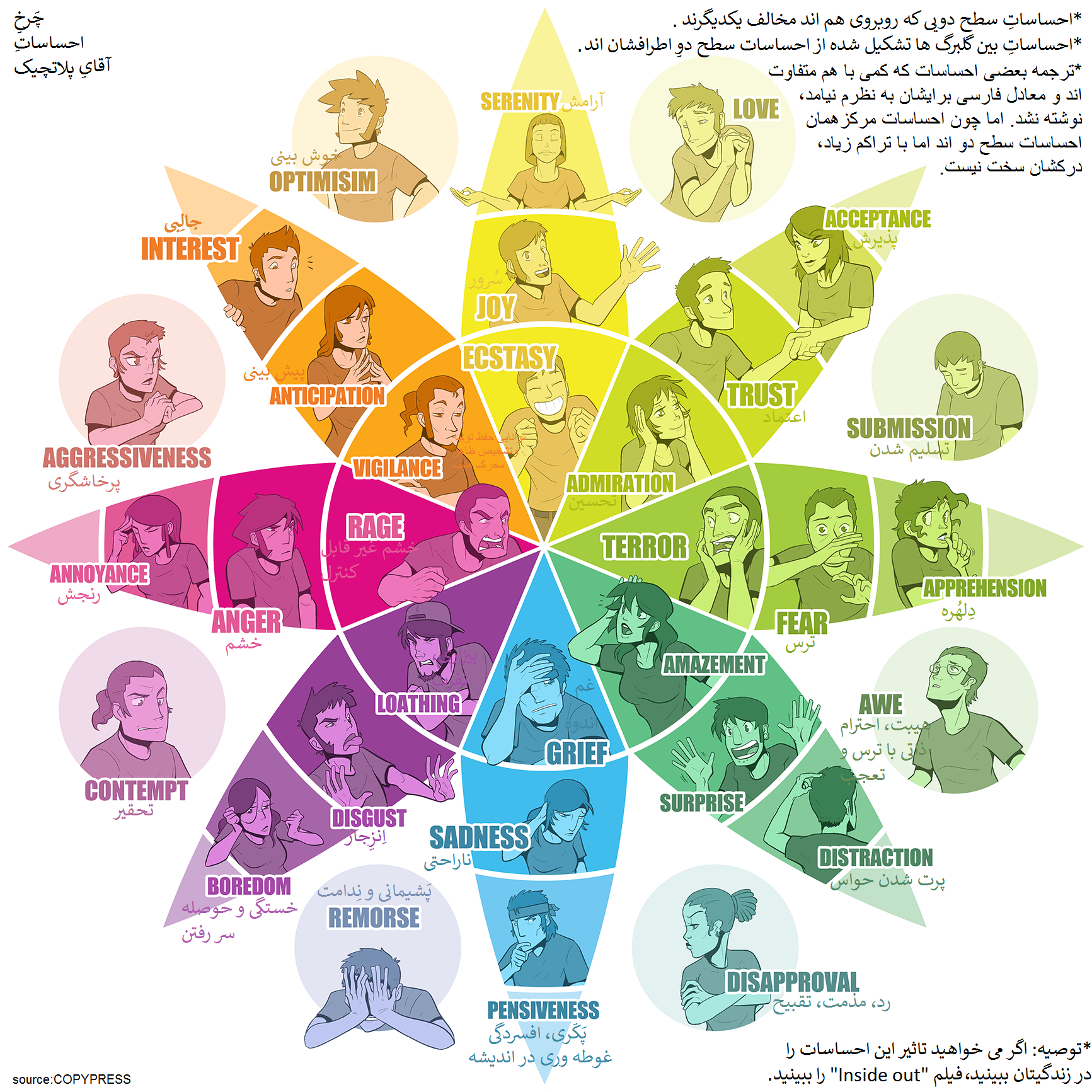 چرخِ احساساتِ آقای پلاتچیک